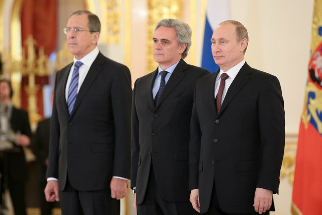 16 января 2014 года Москва, Кремль Фото пресс-службы Президента России Церемония вручения верительных грамот послами иностранных государств. С послом Итальянской Республики Чезаре Марией Рагальини.